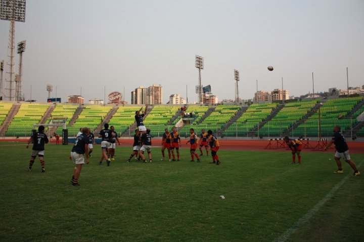 un partido de Rugby entre 2 equipos locales venezolanos, en el Estadio Olímpico de la Ciudad Universitaria de Caracas, Municipio Libertador, Distrito Capital, Venezuela